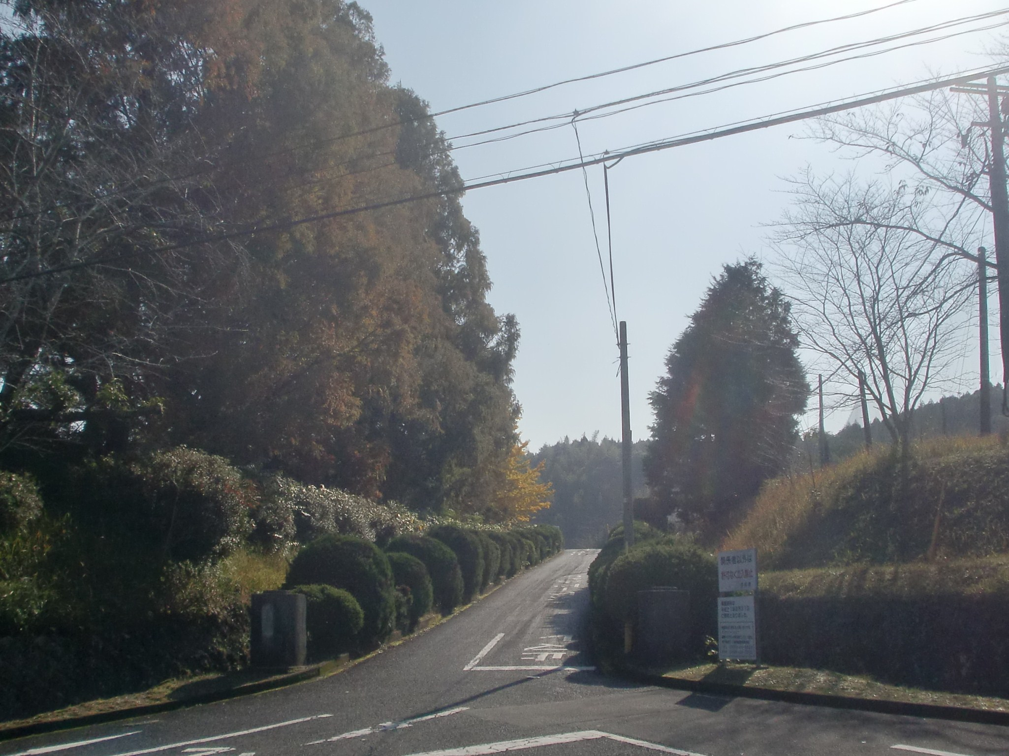 鹿児島県立樋脇高等学校（2009年廃校）跡地の外観。